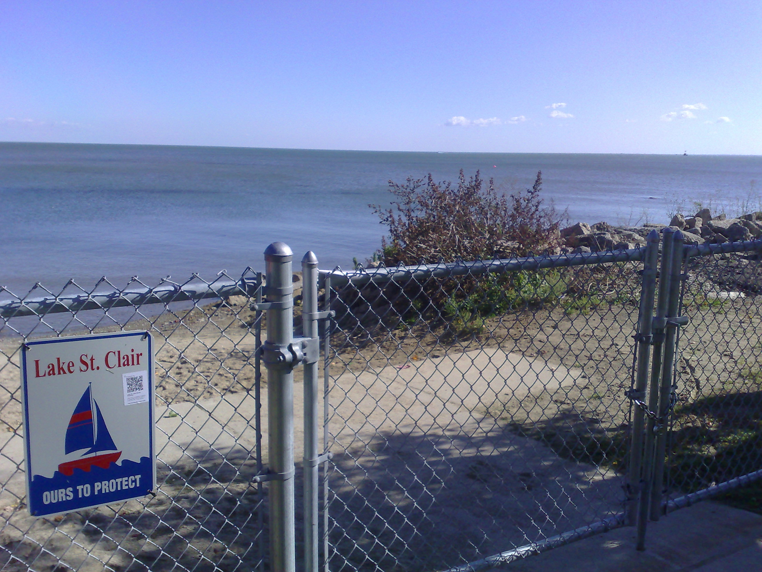 Lake St. Clair. Taken in Grosse Pointe, Michigan